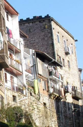 Casa-torre Morrontxo (Morrontxo dorretxea), en Rentería, Guipúzcoa